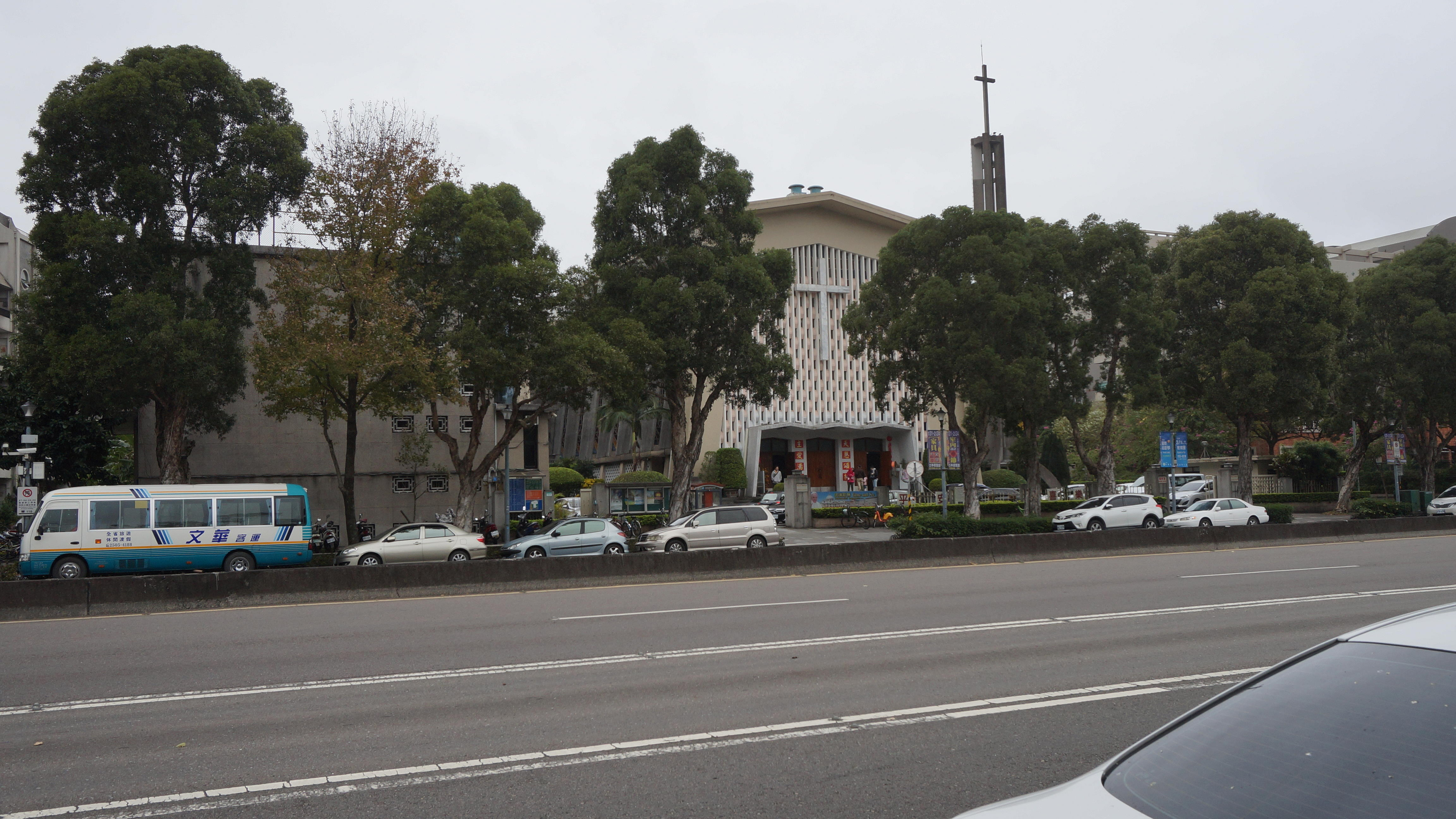 天主教台北總教區台北聖家堂正面。